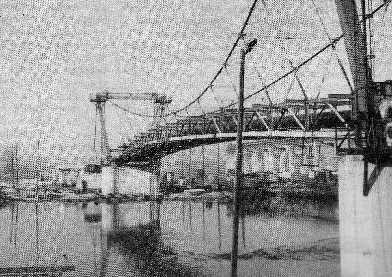 Budowa mostu rurowego w Poznaniu na Warcie (Karolin).